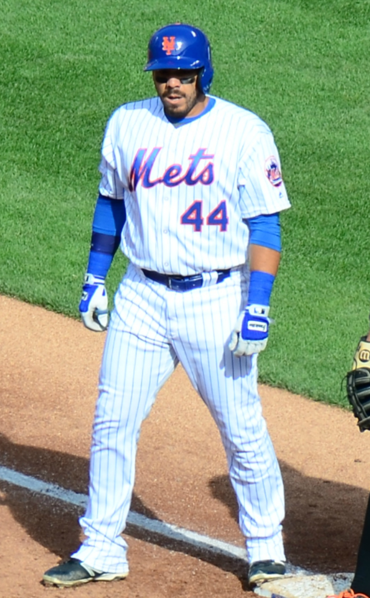 René Rivera